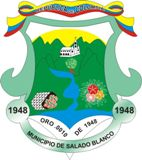 Saladoblanco